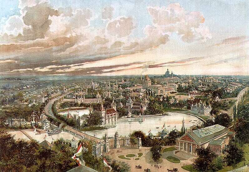 A budapesti Városliget felülnézeti képe az 1896-os millenniumi ünnepségek idején